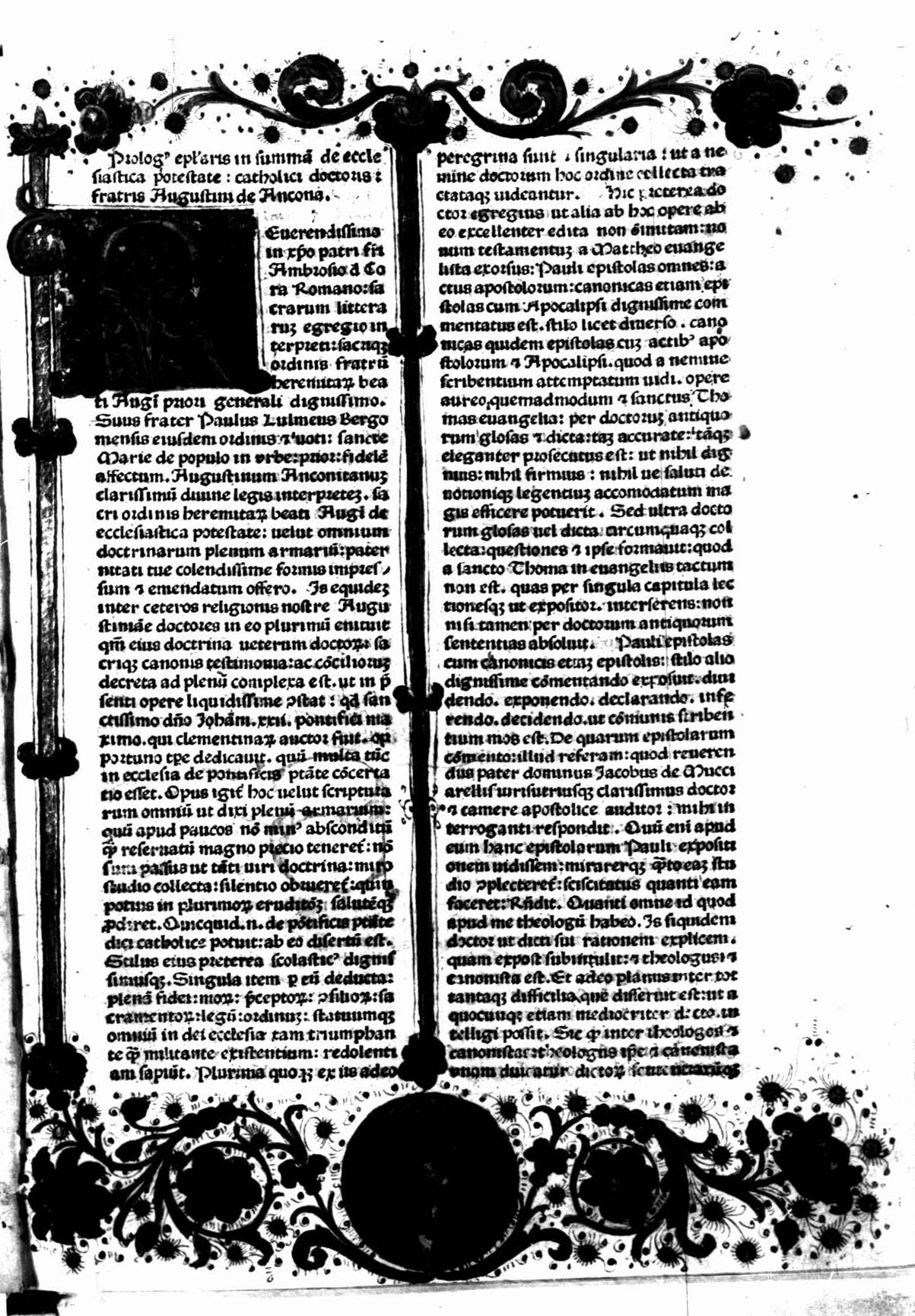 carta